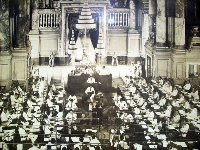 การประชุมรัฐสภาไทย ณ พระที่นั่งอนันตสมาคม สมัย พันเอกพระยาพหลพลพยุหเสนา